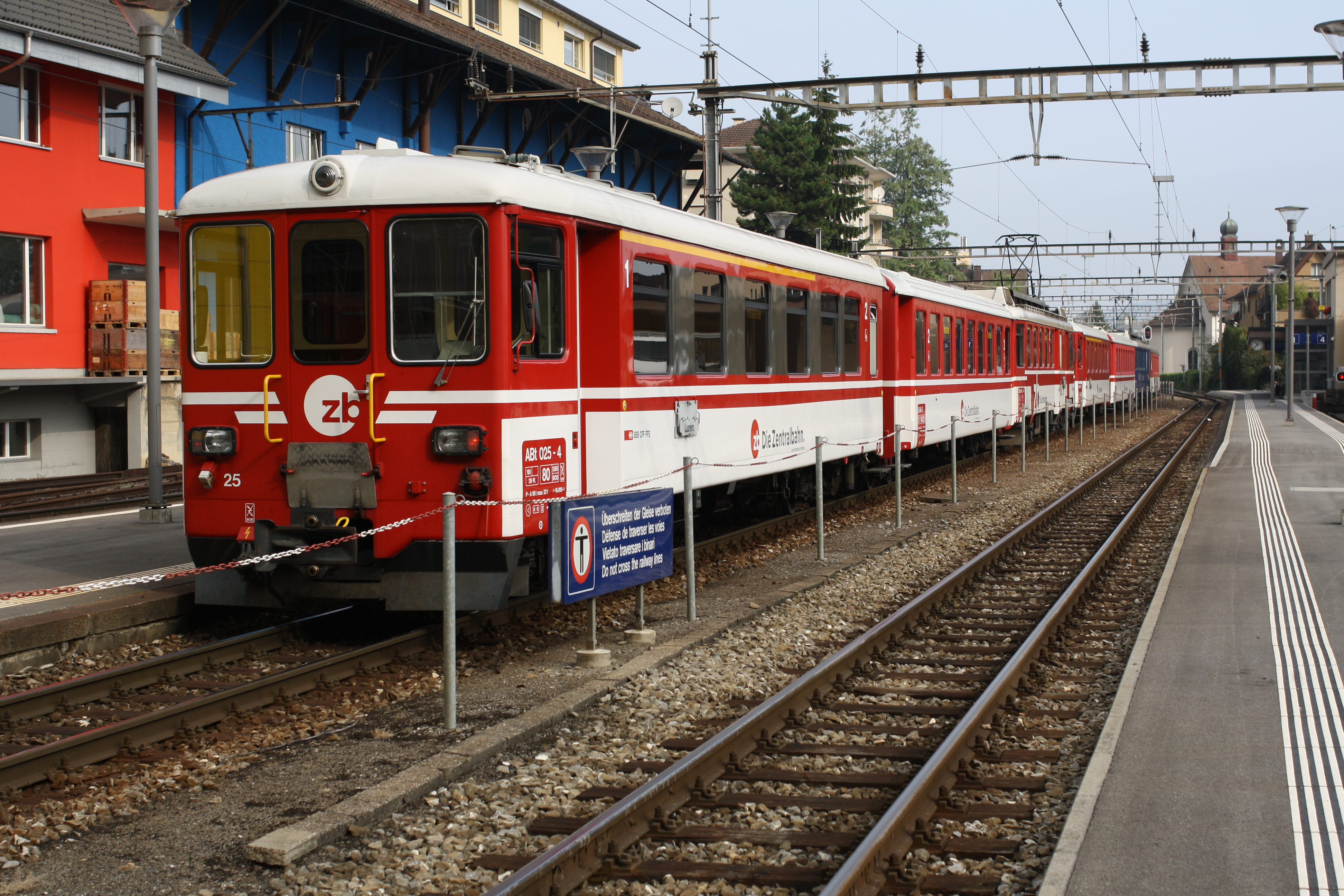 Zentralbahn: Steuerwagen 25 in Hergiswil